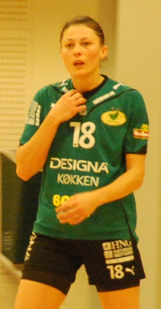 Maja Savić i kamp for Viborg HK, mod Ferencvaros i Viborg Stadionhal. 1/8 finale i EHF Cup Winners Cup, 5. februar 2011 // Viborg HK vs. Ferencvaros 34-33